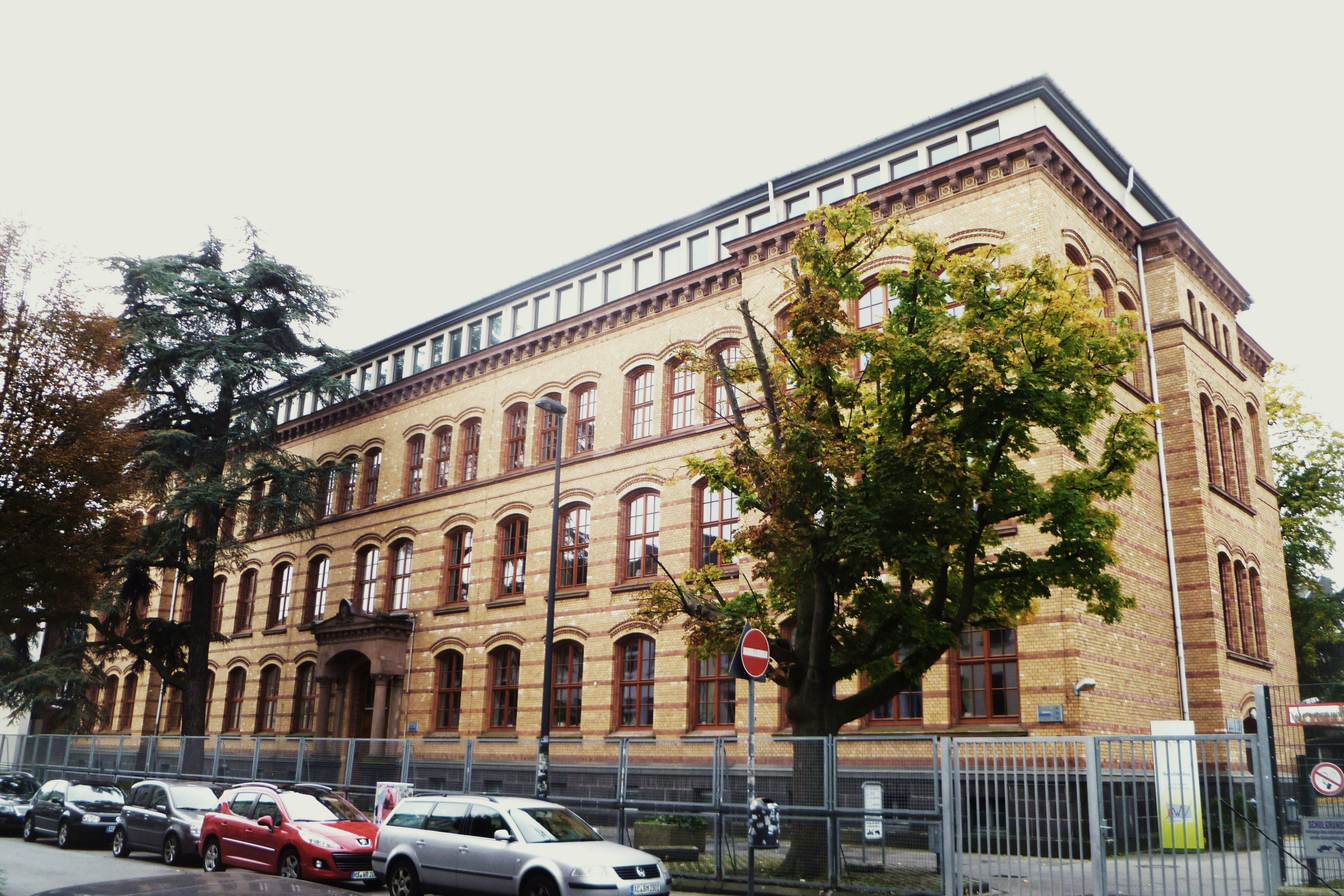 Baudenkmal in Aachen-Mitte; ehemaliges Kaiser-Wilhelm-Gymnasium, heute Berufskolleg für Wirtschaft und Verwaltung